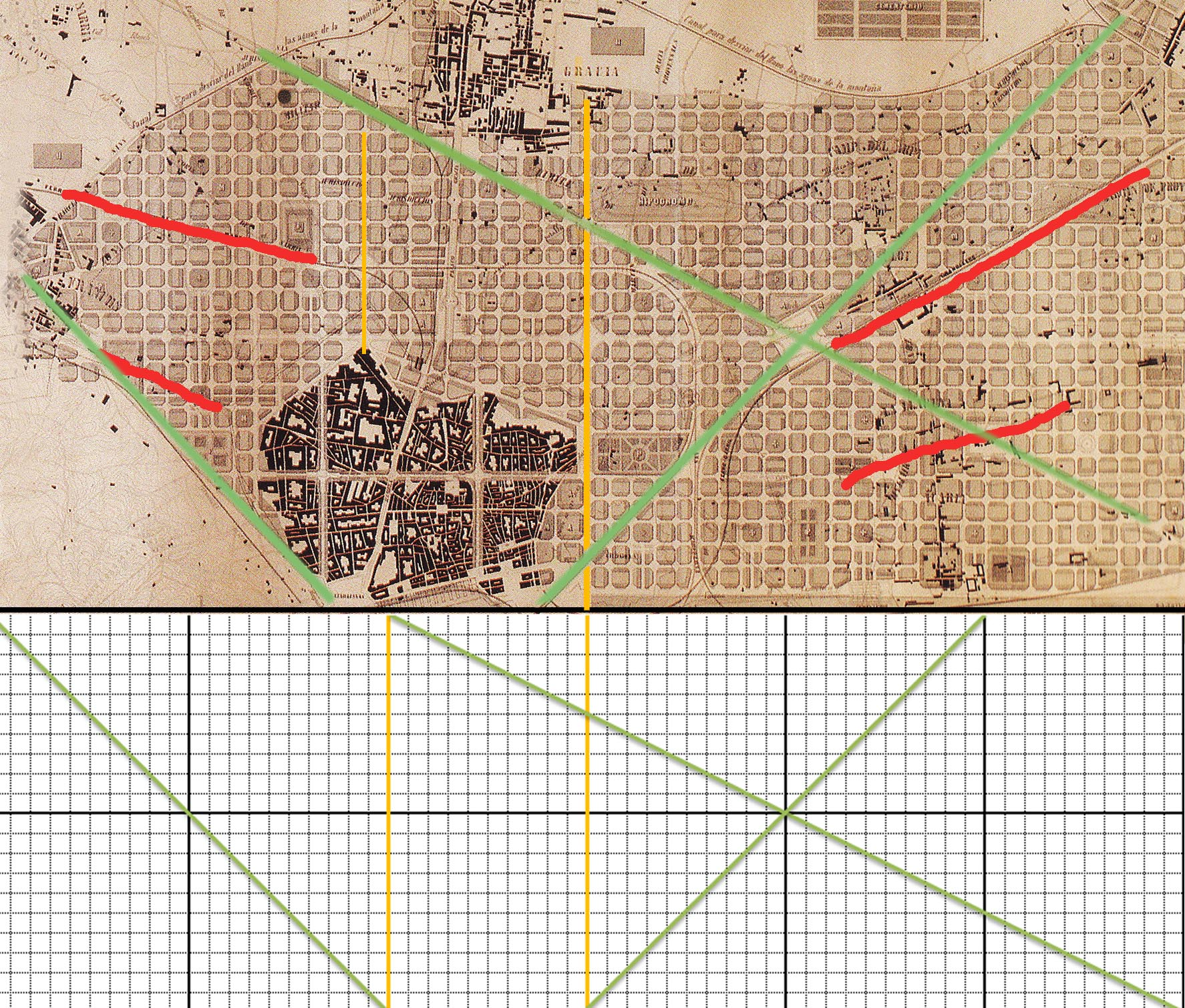 Eixample de Barcelona. Projecció de la trama del Pla Cerdà.